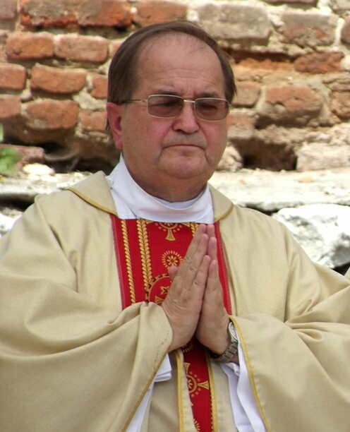 Ojciec dyrektor Tadeusz Rydzyk